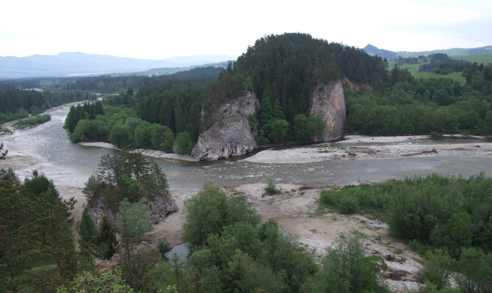 Przełom Białki pod Krempachami. Widok z Obłazowej na Kramnicę